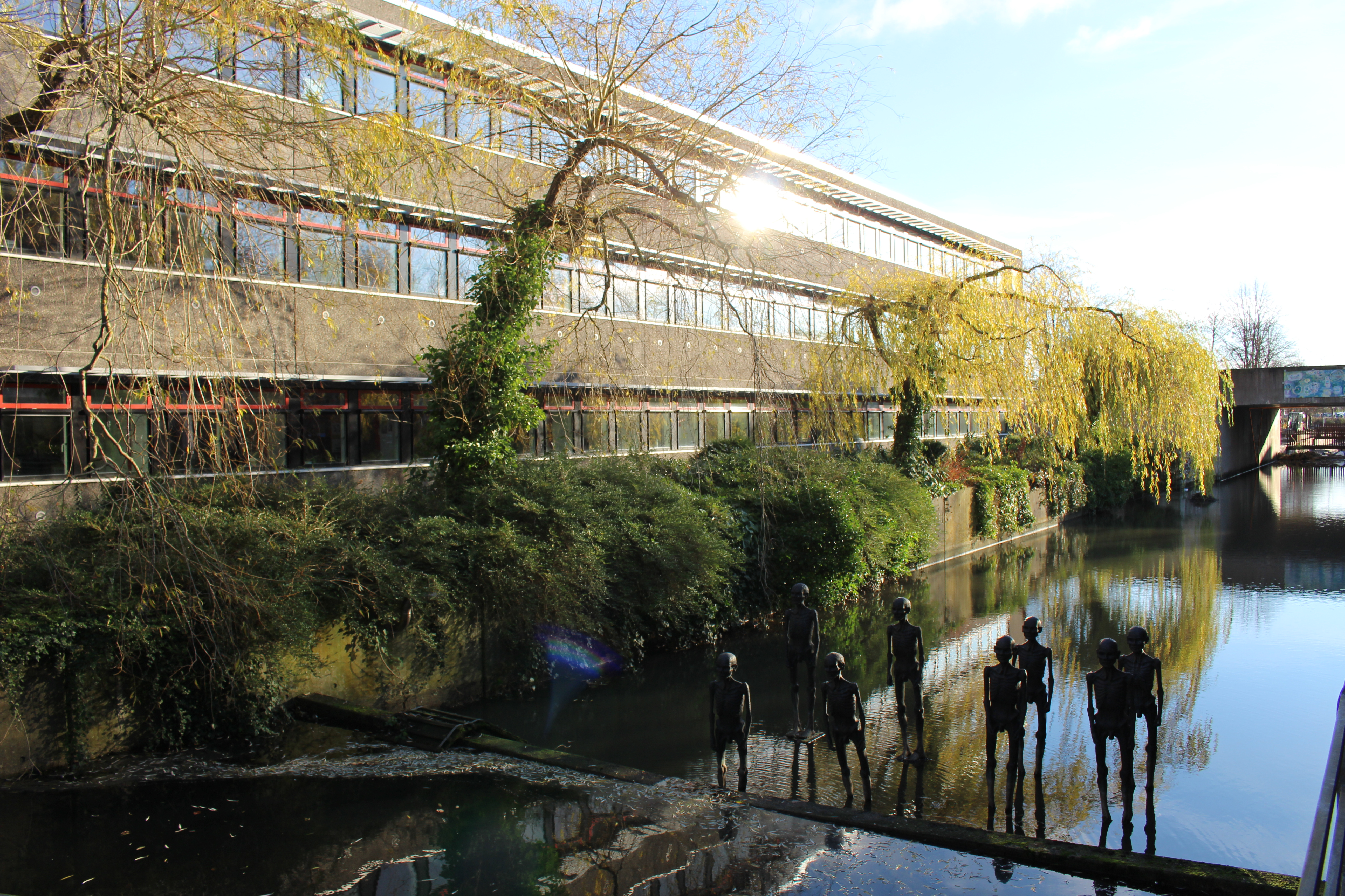 Albertslund Rådhus længe 1